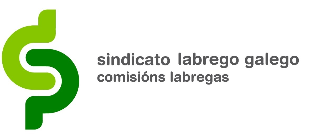 Logo do Sindicato Labrego Galego